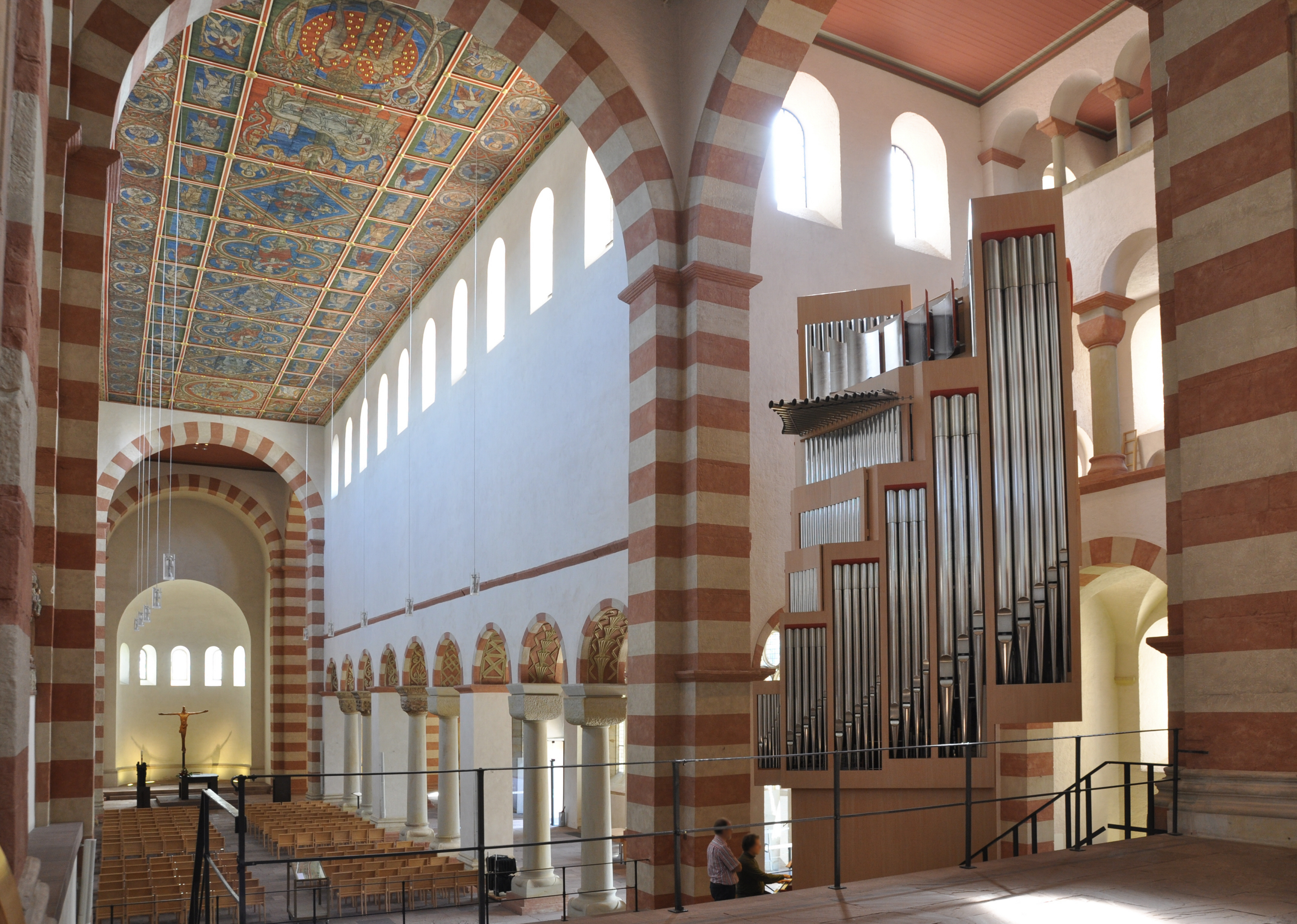 Blick vom Westchor durchs Westquerschiff mit Orgel zum Ostchor